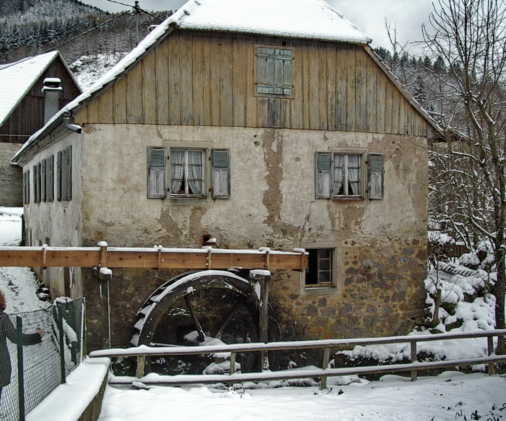 Moulin de Storckensohn, Haut-Rhin, Alsace, France